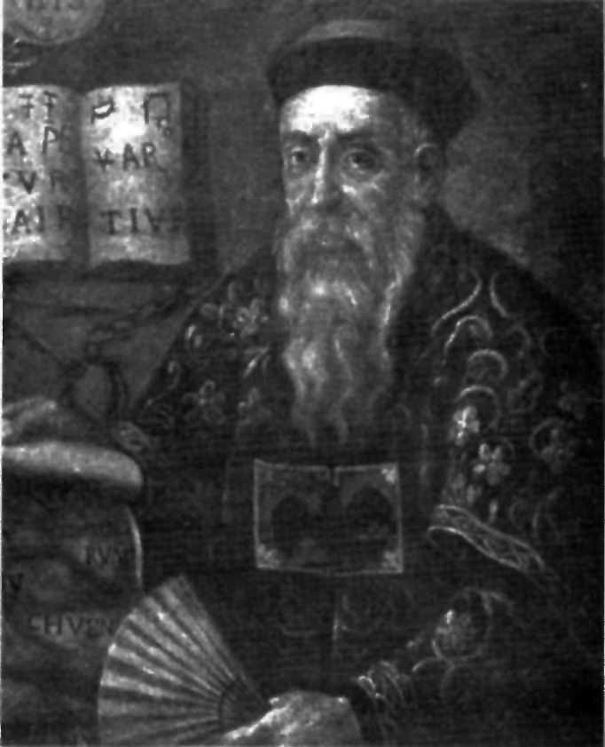 Quadro raffigurante Padre Ludovico Buglio